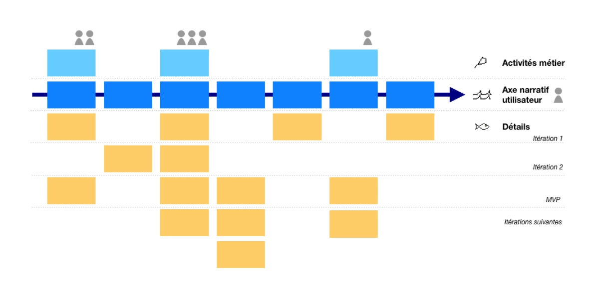 Cartographie de récits utilisateur - User story mapping - principe général